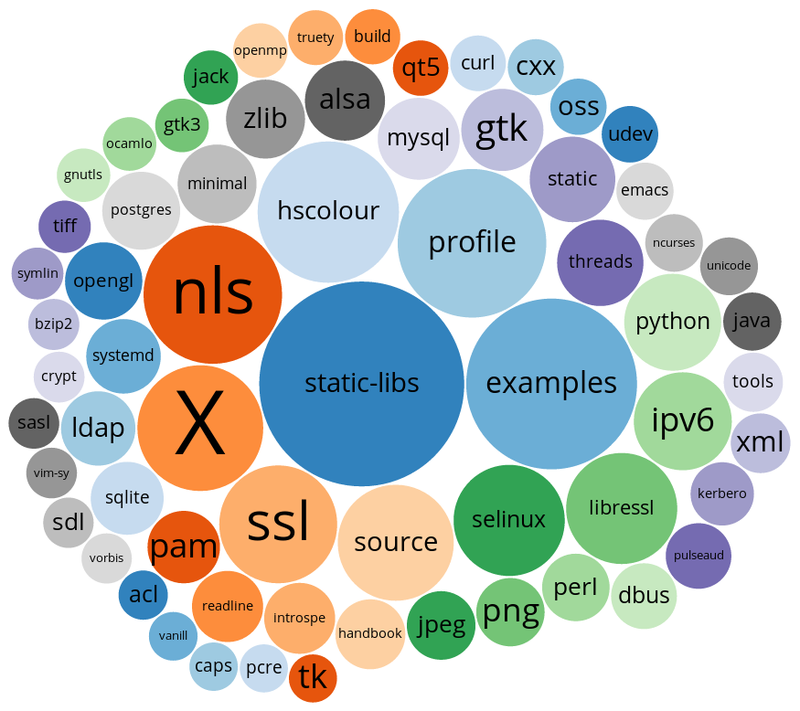 Gentoo USE flag használat